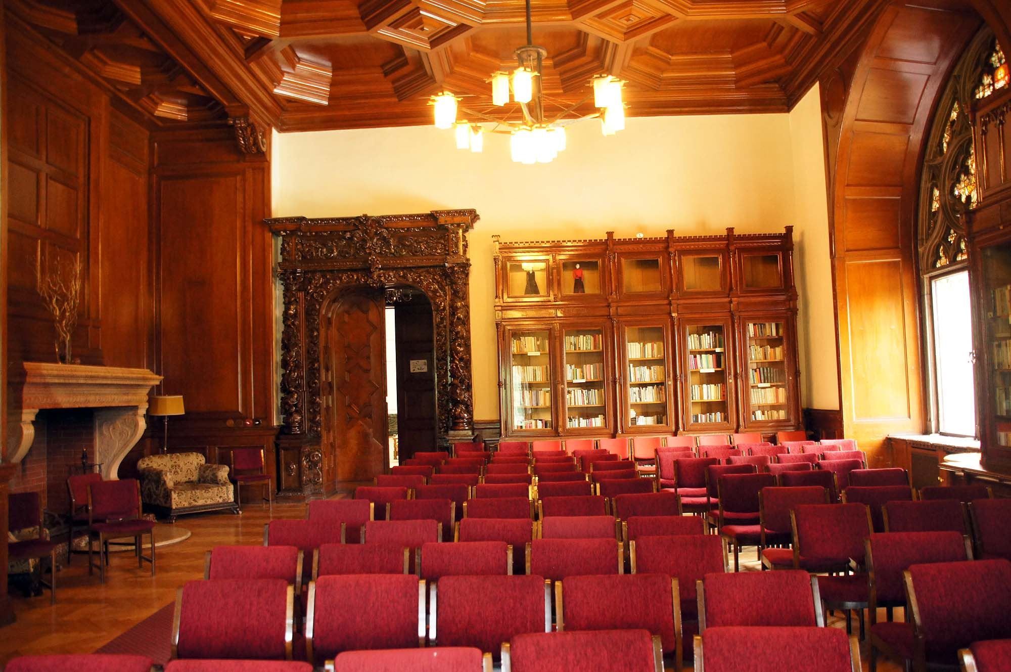 Moszna, zespół pałacowy, XVIII, XX